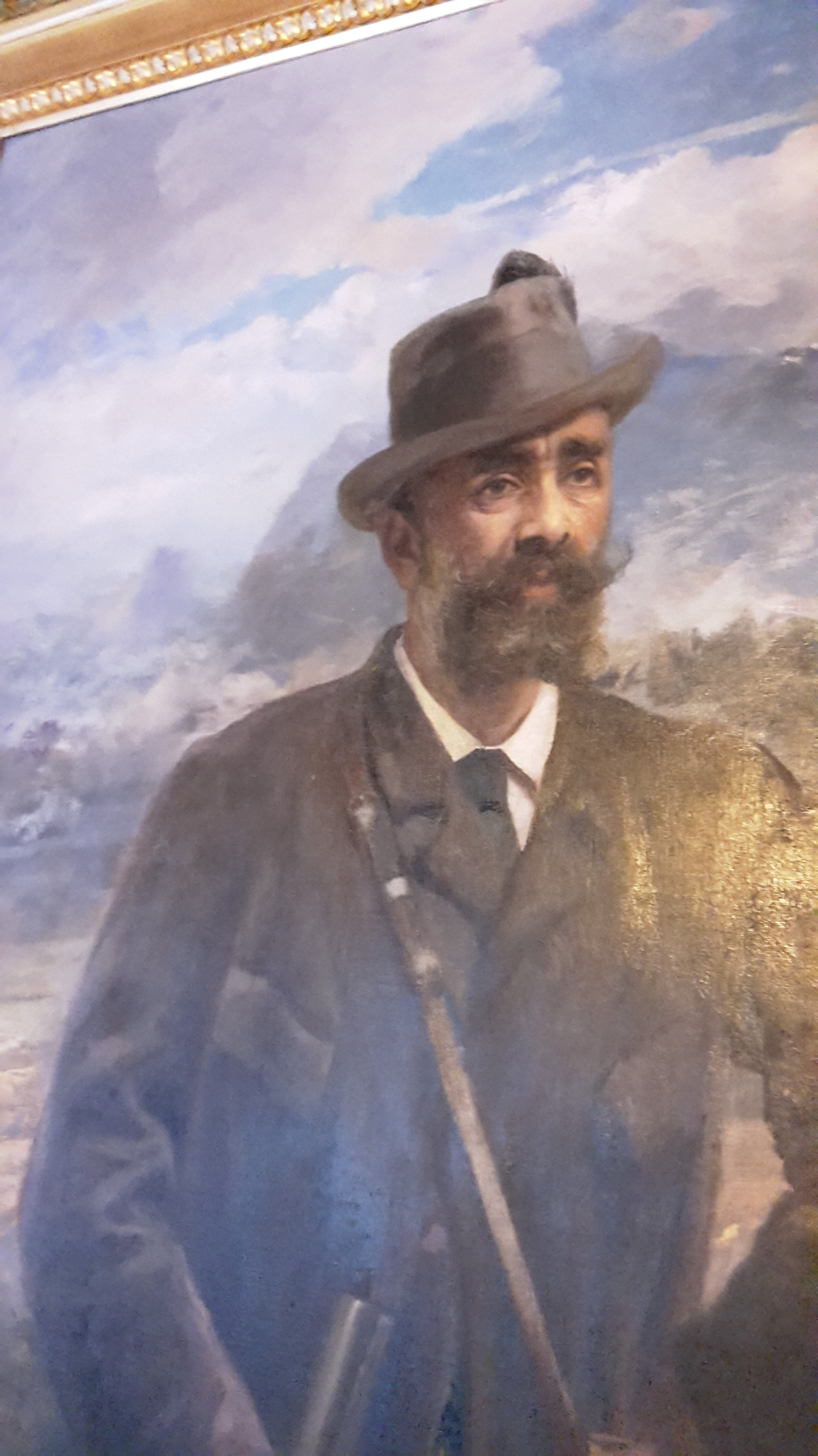 Primo piano di Luigi Beck Peccoz, ritratto di Cesare Tallone (1892)